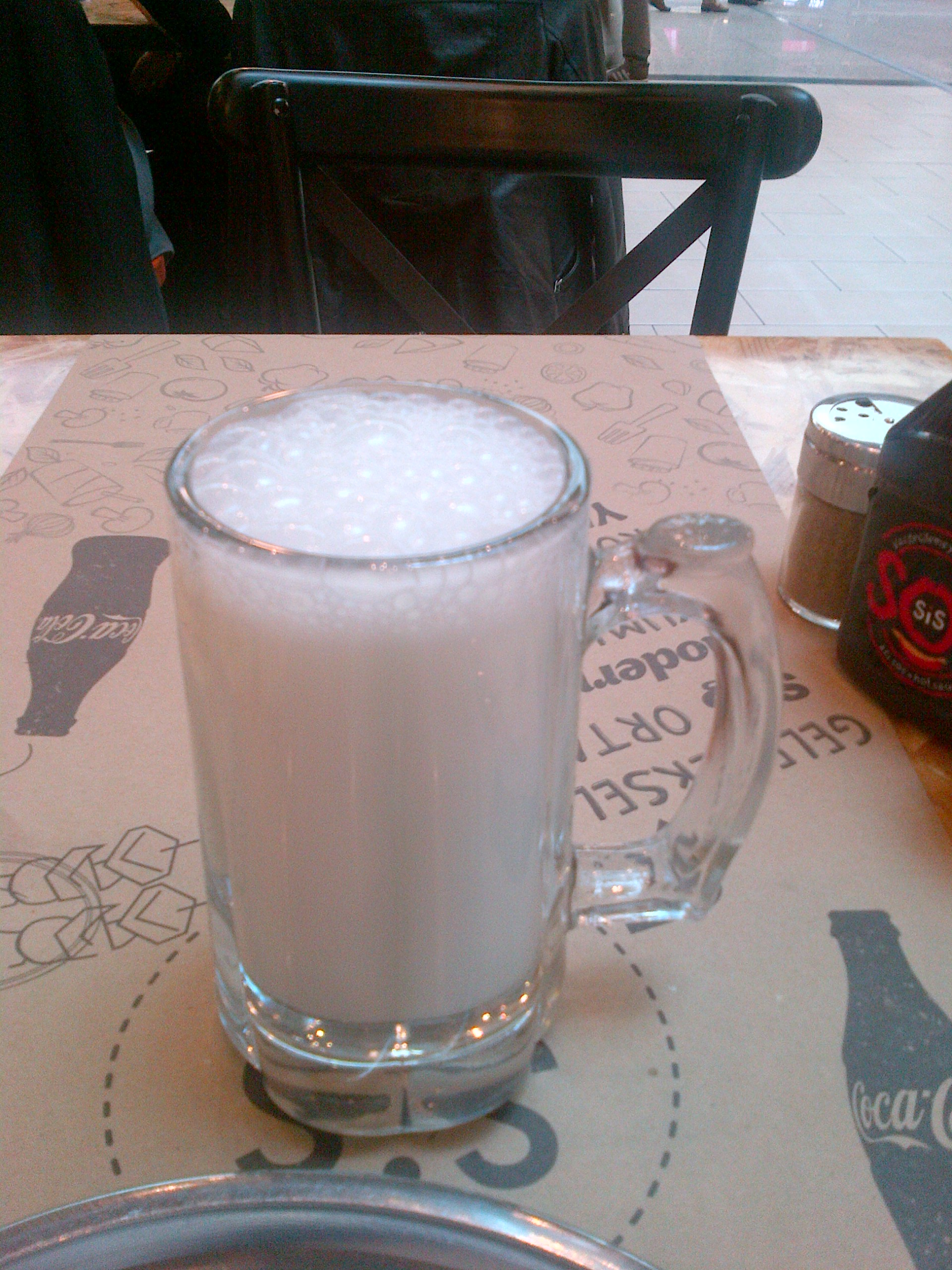 Ayran con espumitas de crema de leche de la cocina turca.